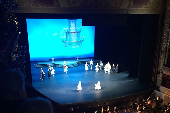 Theatrical scene. View from above